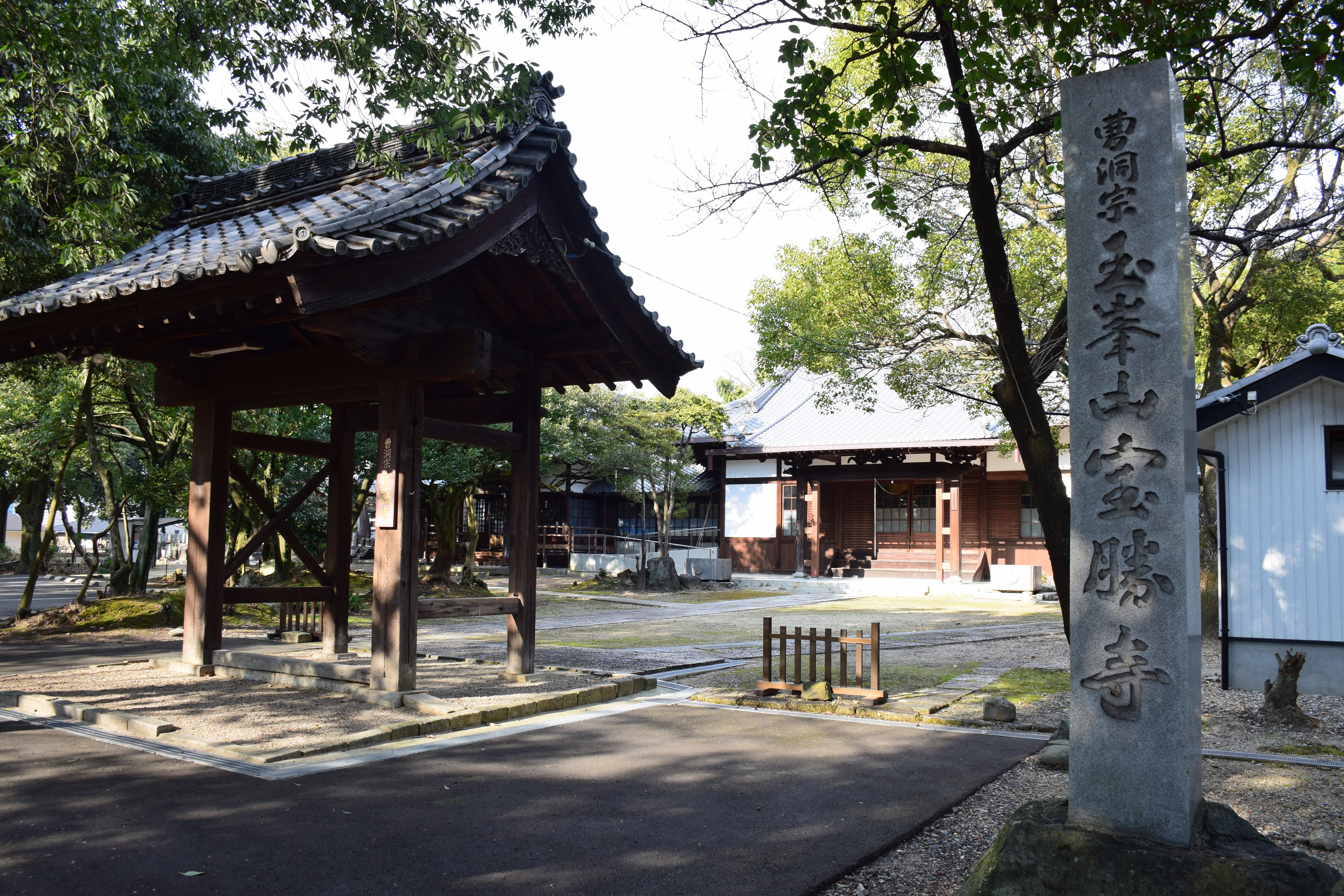 宝勝寺の山門と本堂